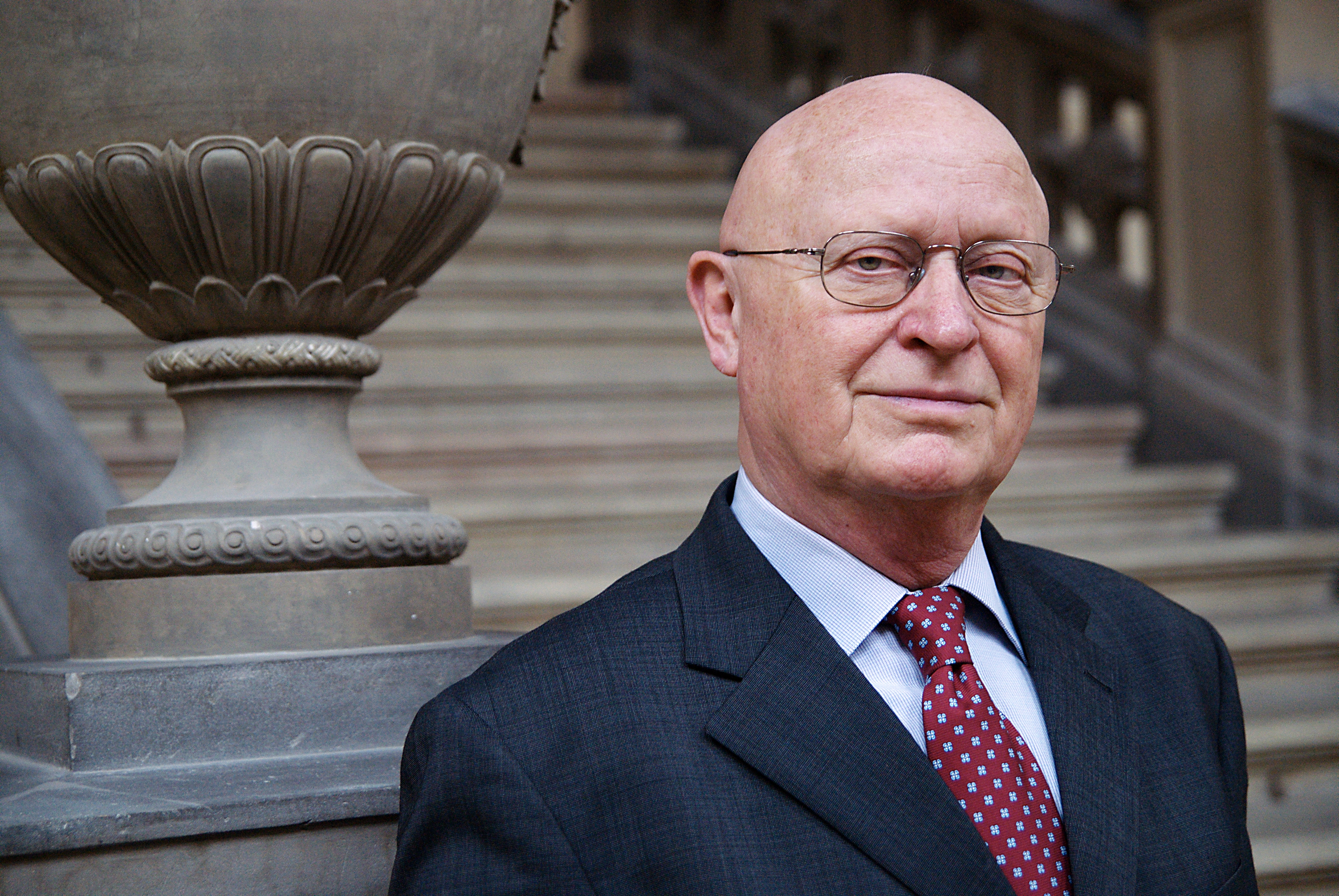 Václav Pačes (* 2. února 1942 Praha) je český vědec, vysokoškolský pedagog, biochemik a v letech 2005–2009 předseda Akademie věd České republiky. Mezi roky 2010–2012 byl předsedou Učené společnosti České republiky.